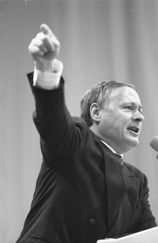 30.8.-2.9.1988 SPD-Parteitag in Münster, Halle Münsterland